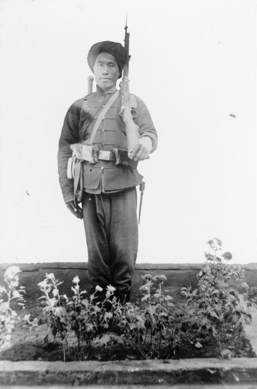 Chinesischer regulärer Infanterist [Originaltext aus Album]